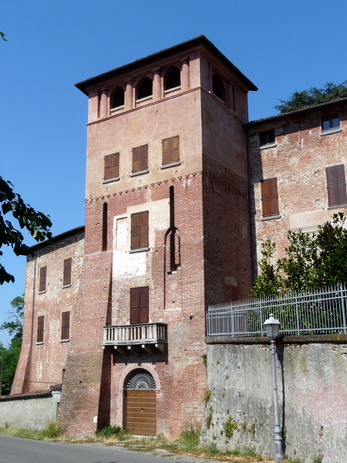 Castello di Basaluzzo, Piemonte, Italia